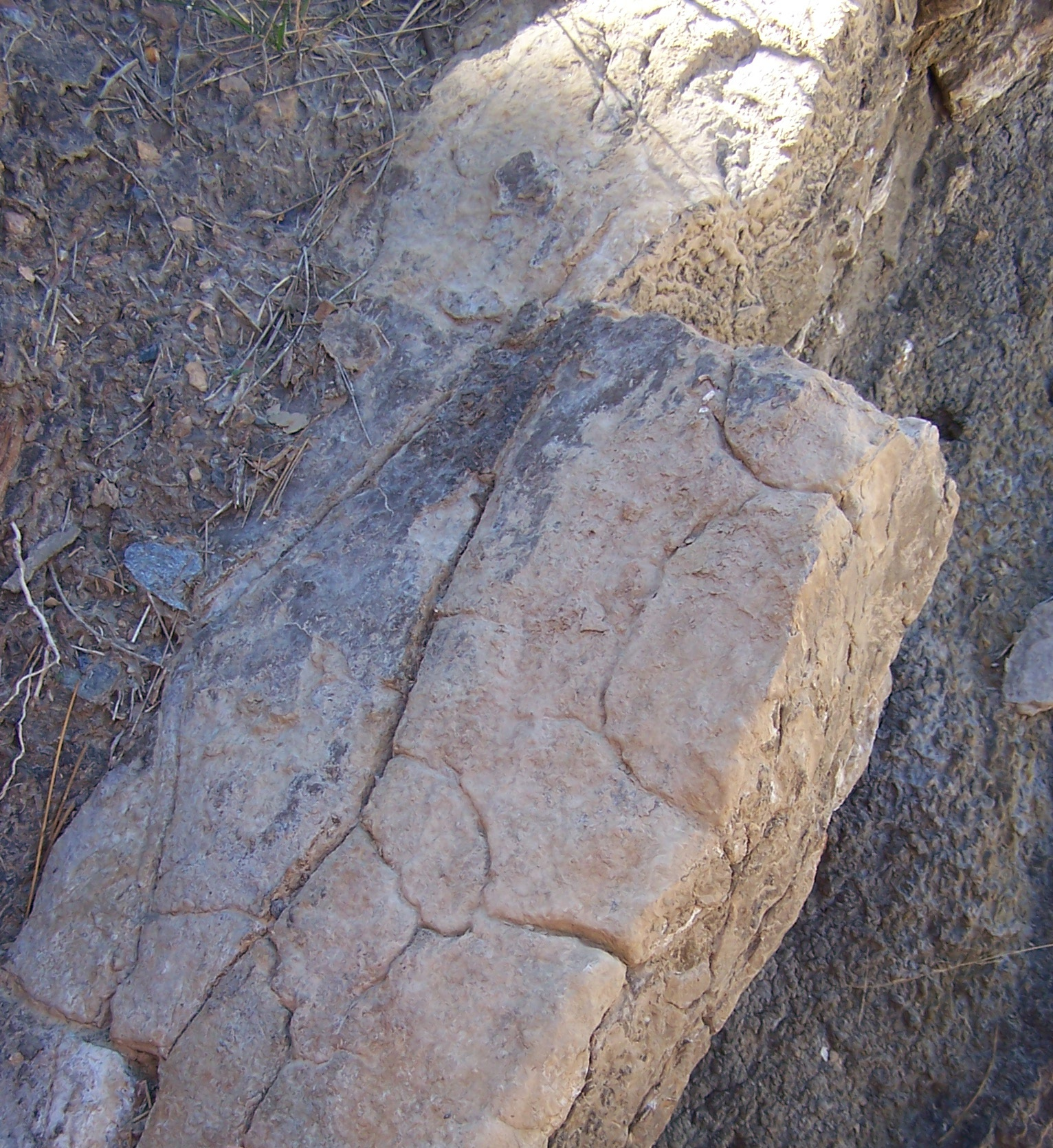 Eigen bewerking van nl::Afbeelding:Krimpscheuren.jpg